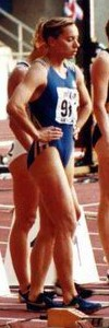 Semifinal de 100 m en el Campeonato del Mundo de Sevilla 99, con Marion Jones, Debbie Ferguson, Christine Arron, Zhanna Tarnopolskaya-Pintusevich, Andrea Philipp y Lauren Hewitt.